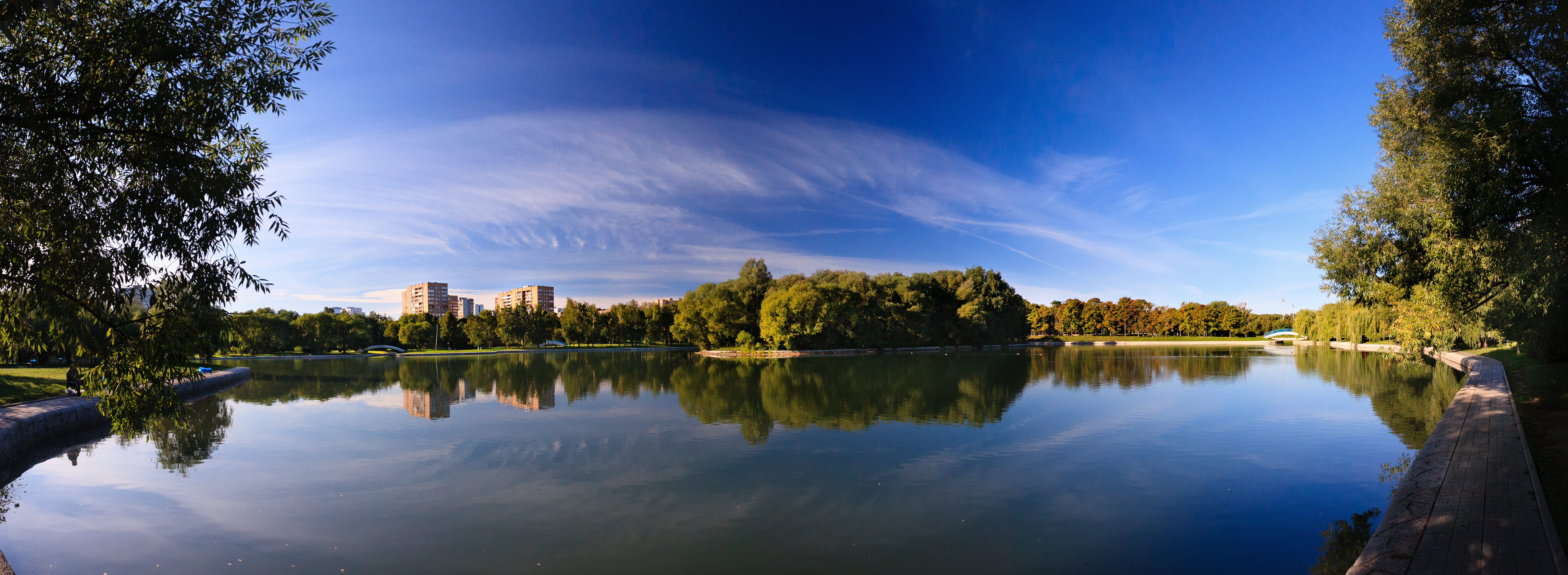 Панорама Фестивальных прудов в парке Дружбы, в центре - Утиный остров. САО Москвы, станция метро "Речной вокзал". Парк Дружбы был основан в честь VI Всемирного фестиваля молодёжи и студентов 1957 года. Архитекторы - Галина Ежова, Анатолий Савин, Валентин Иванов, руководитель проекта - Виталий Долганов.